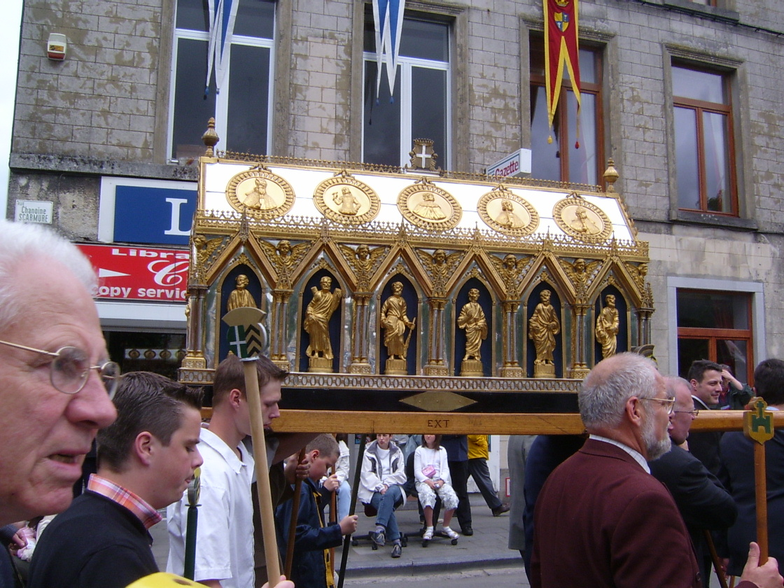 Chasse Saint Vincent Procession 2007 Soignies/Zinnik